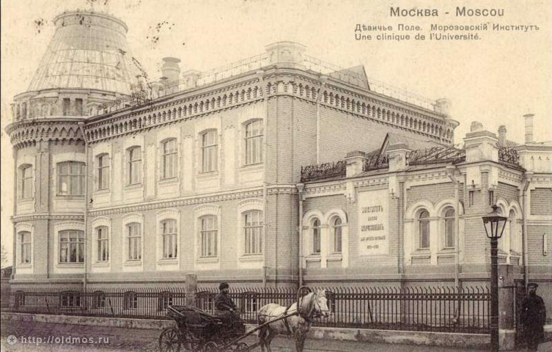 Здание института раковых заболеваний в Клиническом городке на Девичьем поле (1903) // Малая Пироговская 20 стр. 19 - ныне институт тропических болезней и паразитов